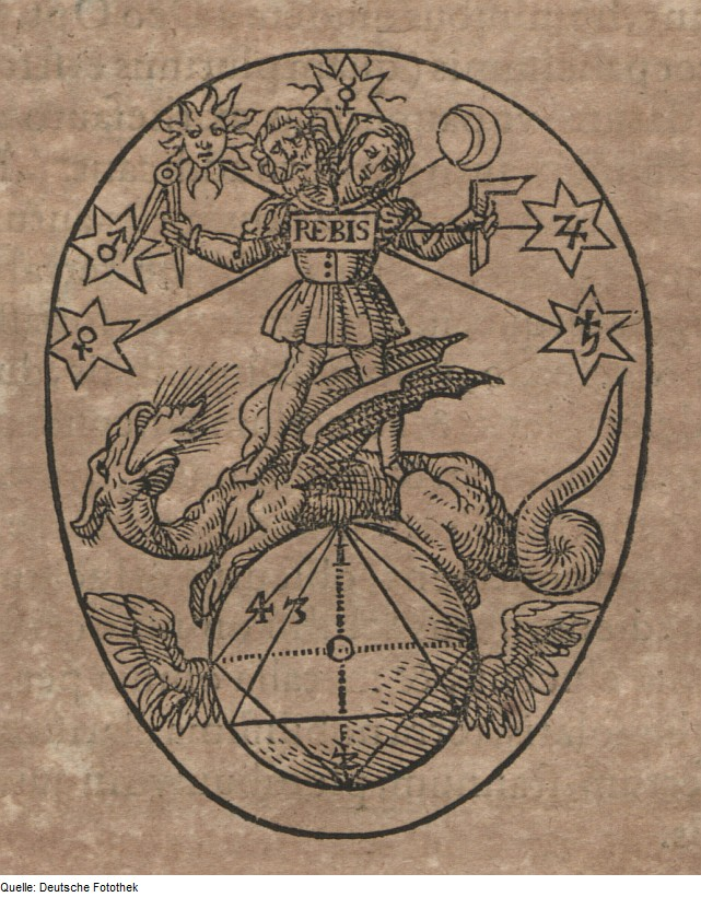 Original image description from the Deutsche Fotothek Theosophie & Alchemie & Hermetik